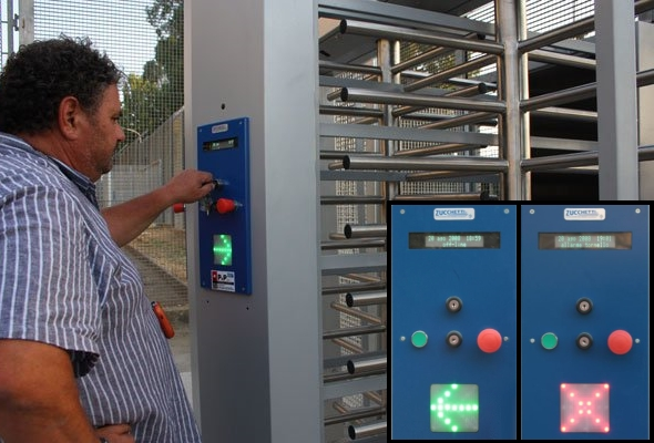 Tornelli istallati dalla società informatica ZUCCHETTI, Stadio San Vito, Cosenza